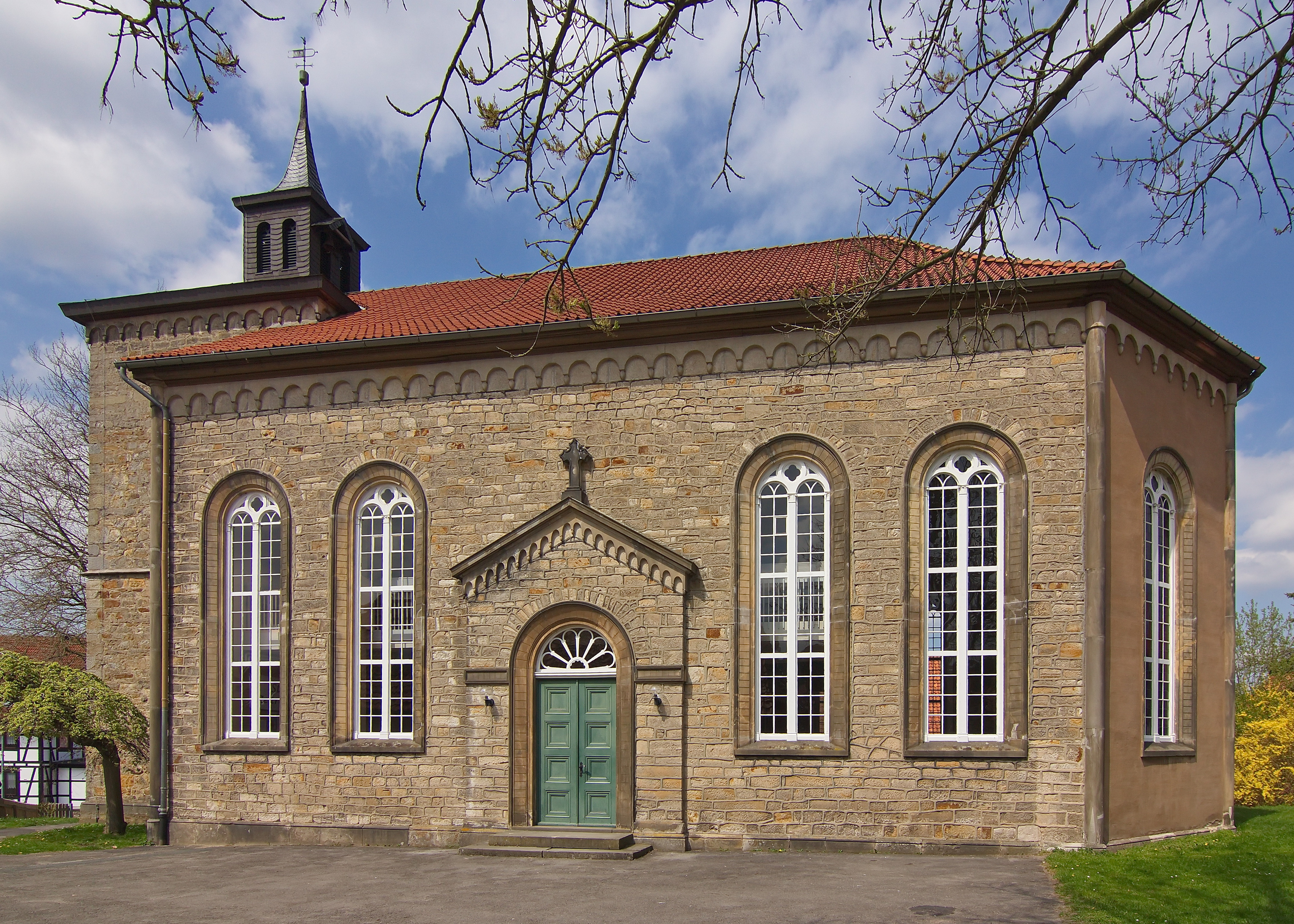 Baudenkmal in Altenhagen I (Springe), Niedersachsen, Deutschland